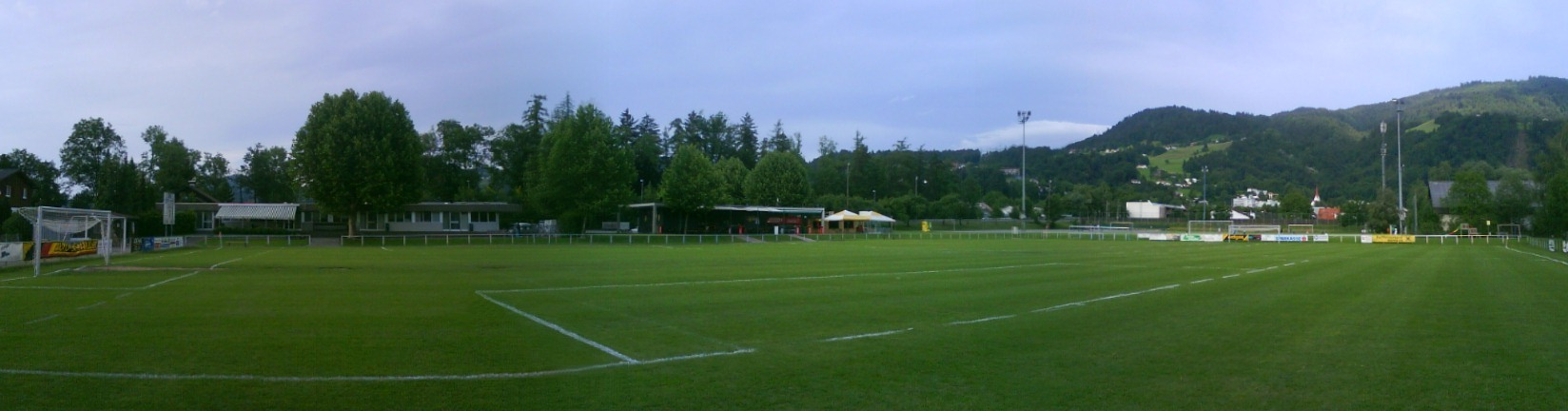 Sportplatz des Dornbirner Sportvereins.